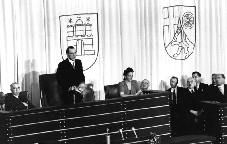 Am 7. September 1949 wird Erich Köhler (CDU) zum 1. Präsidenten des Deutschen Bundestages gewählt. Im Bild: Erich Köhler spricht zu den Abgeordneten.